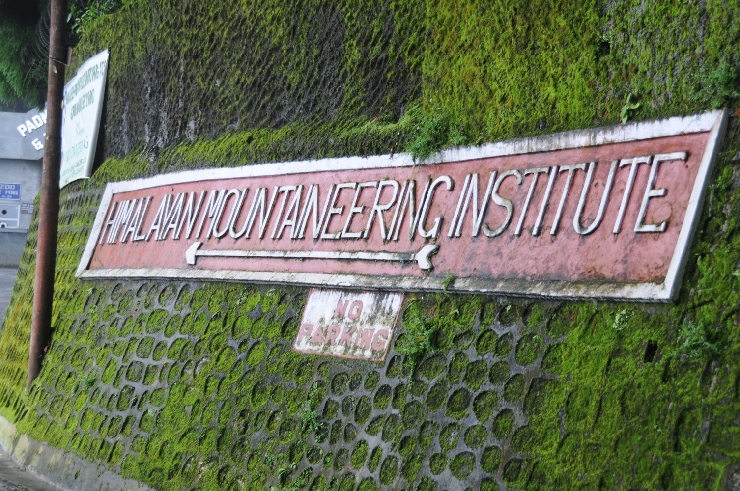 We didn't get to go .. too late. Darjeeling, India